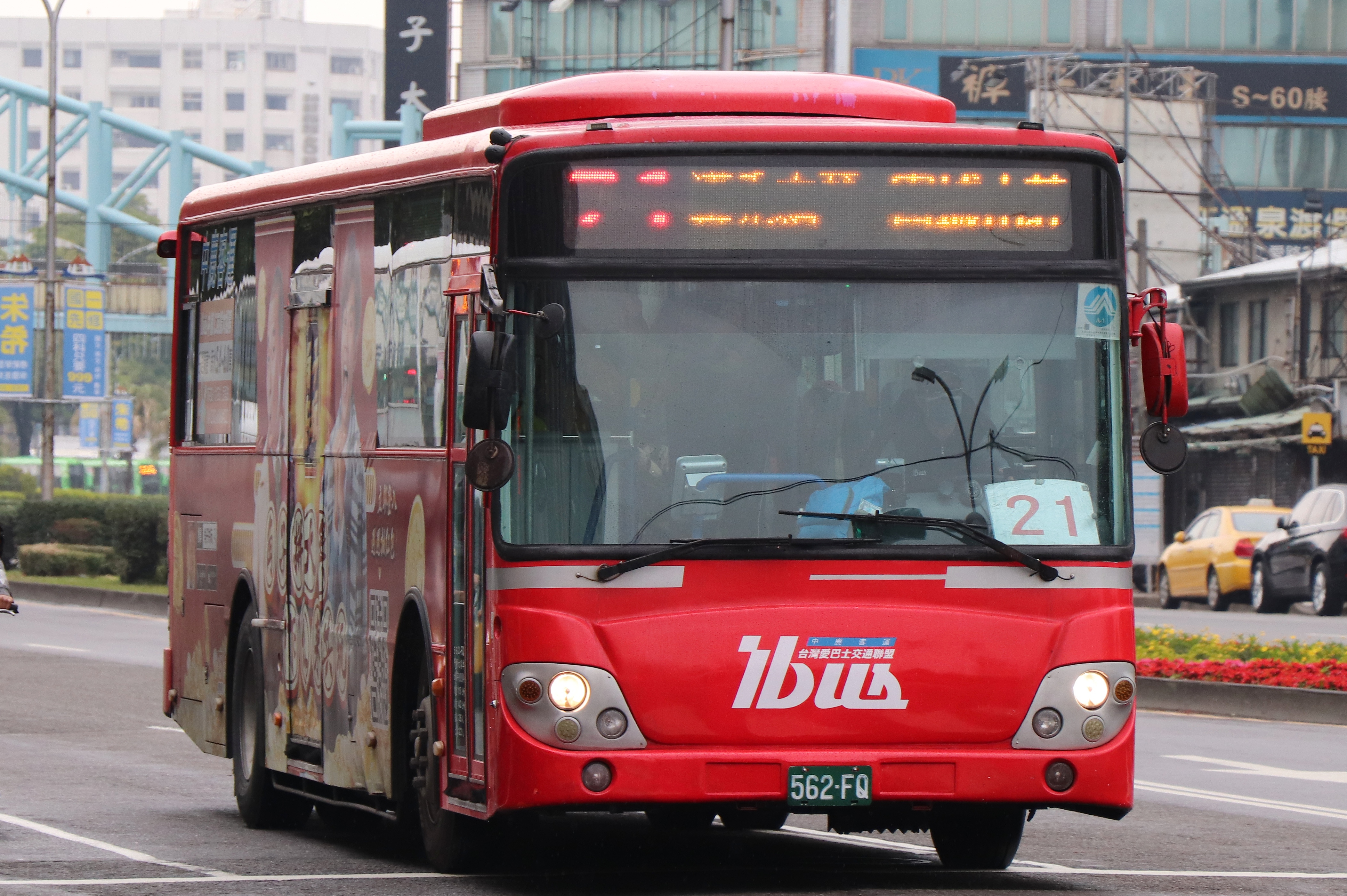 中鹿客運 大宇BC211ML大客車 562-FQ